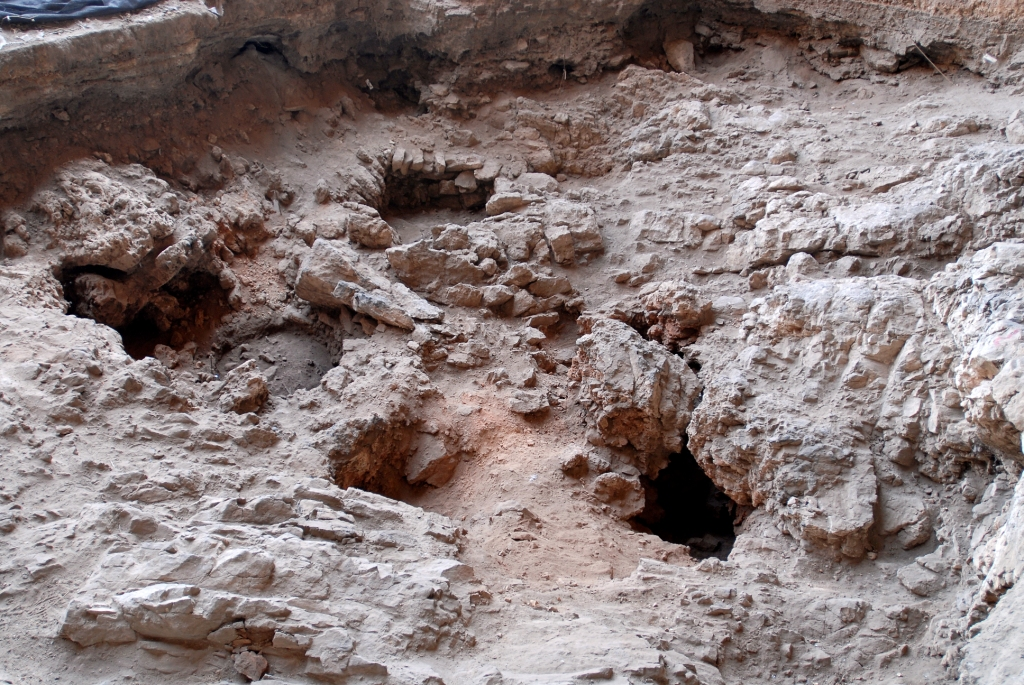 HILAZON excavation site July 2006